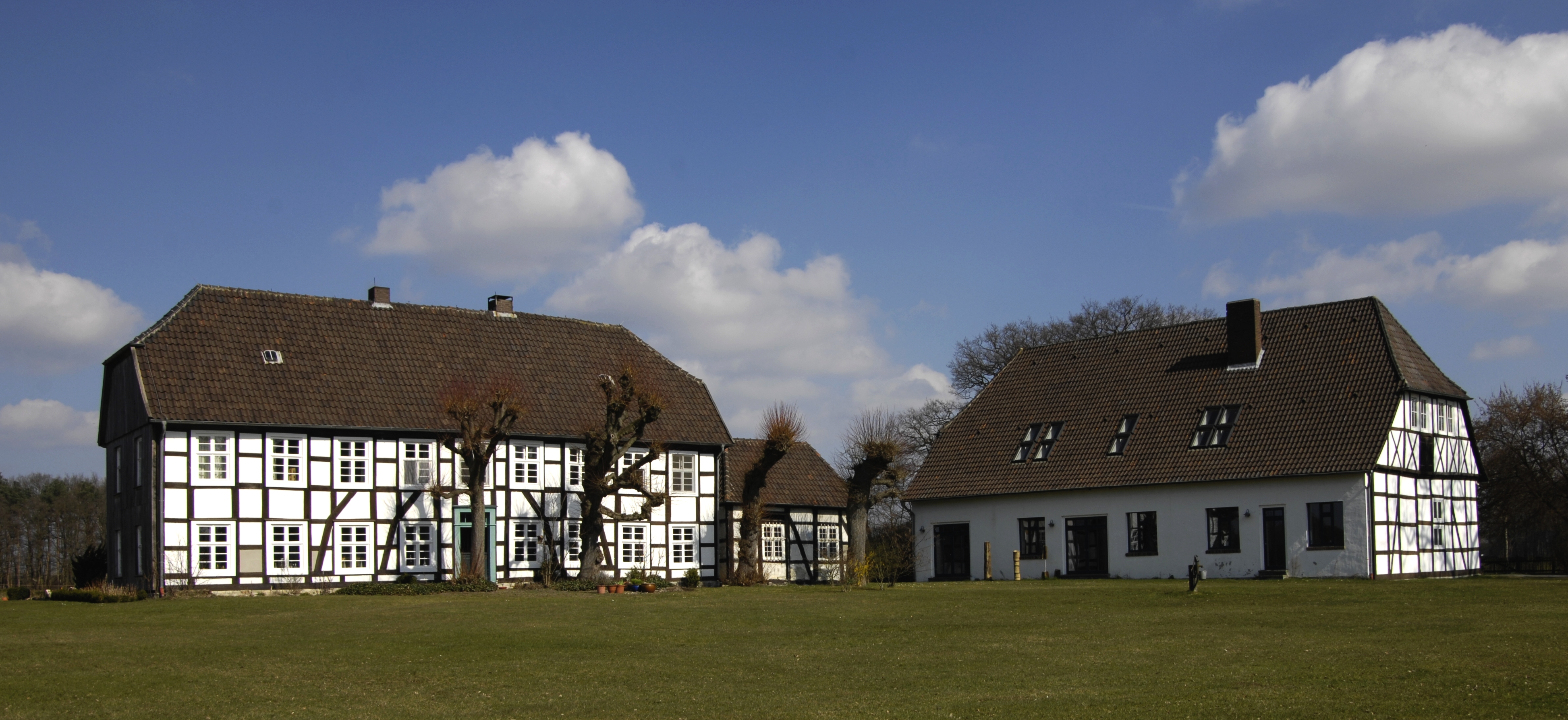 Gut Winkhausen (03/2011) This is a photograph of an architectural monument.